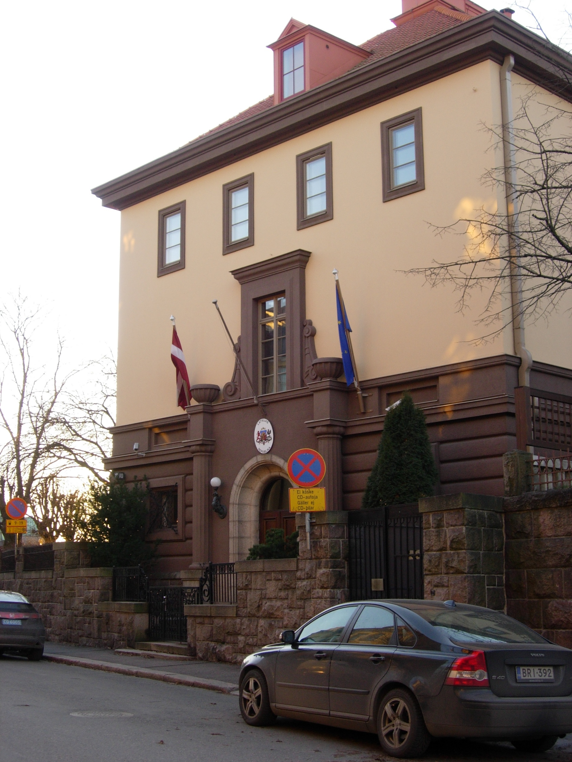 Latvian Suomen suurlähetystö, Armfeltintie 10, Helsinki, Eira. Arkkitehti: Valter Jung. Rakennusvuosi: 1921.